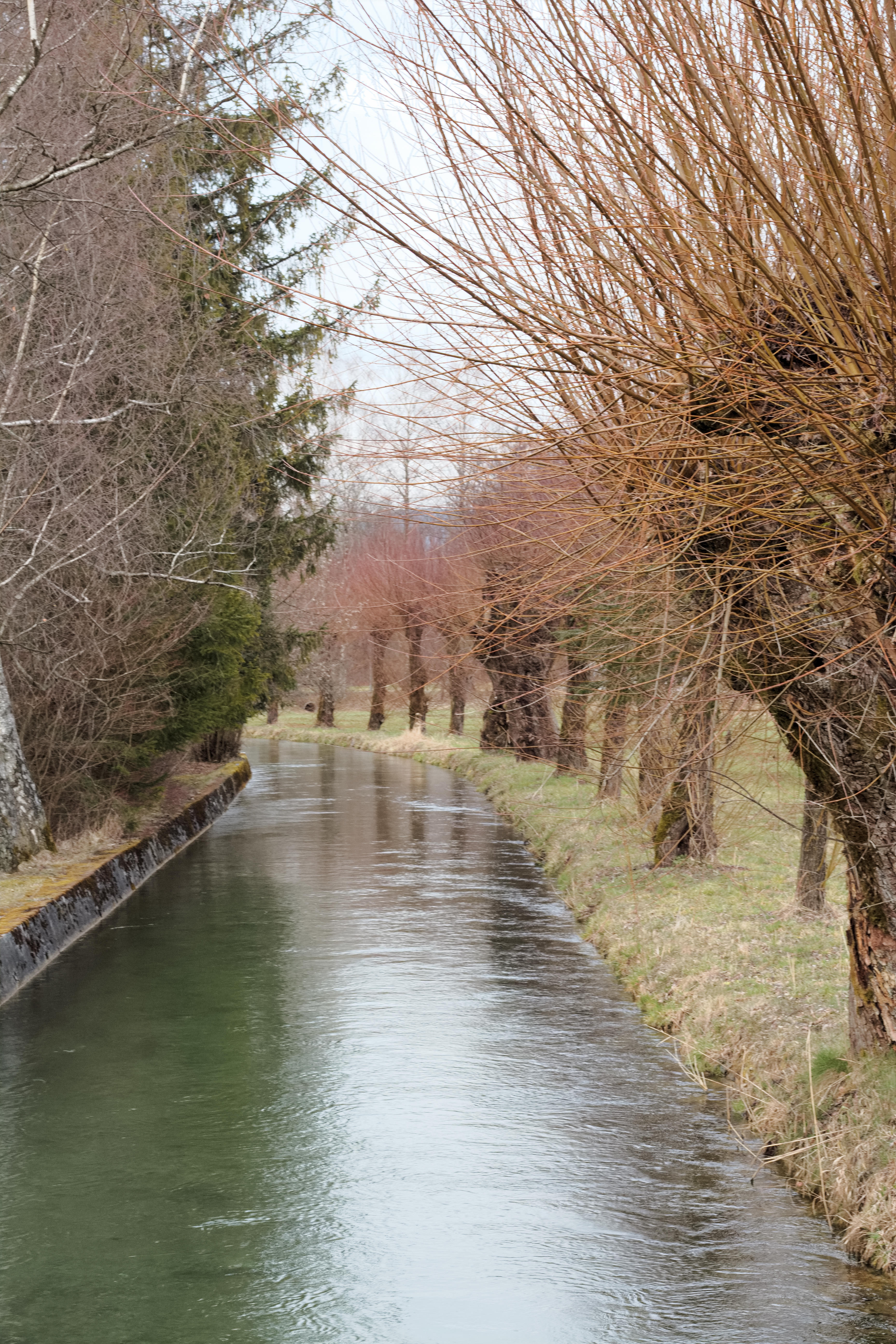 Schutzgebiet Kopfweiden am Almkanal in den Salzburger Stadtteilen Morzg und Gneis.